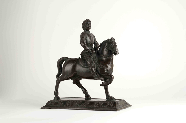 Héctor ecuestre (Renacimiento). Número de inventario: 52173.